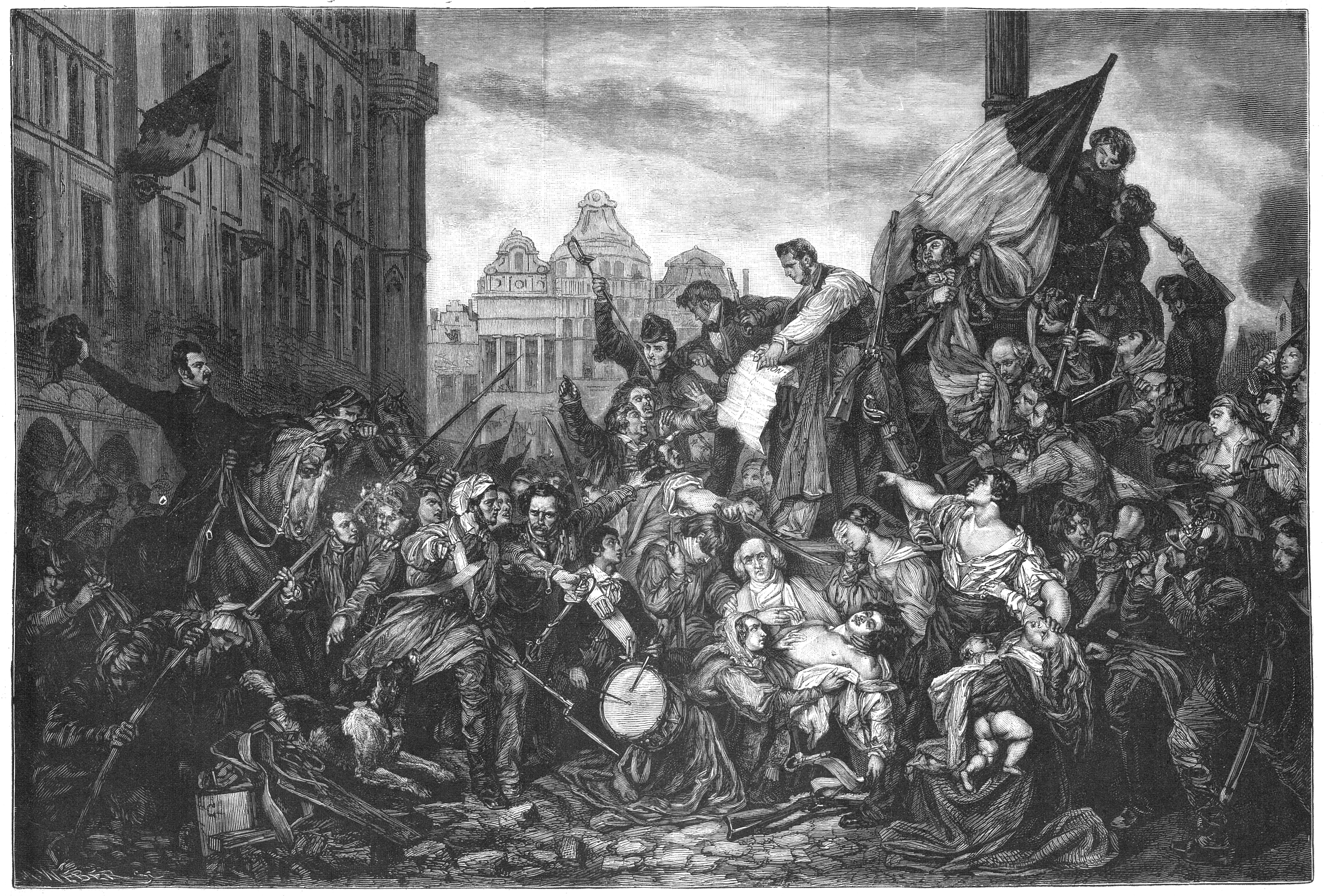 Un épisode de la révolution belge de 1830.